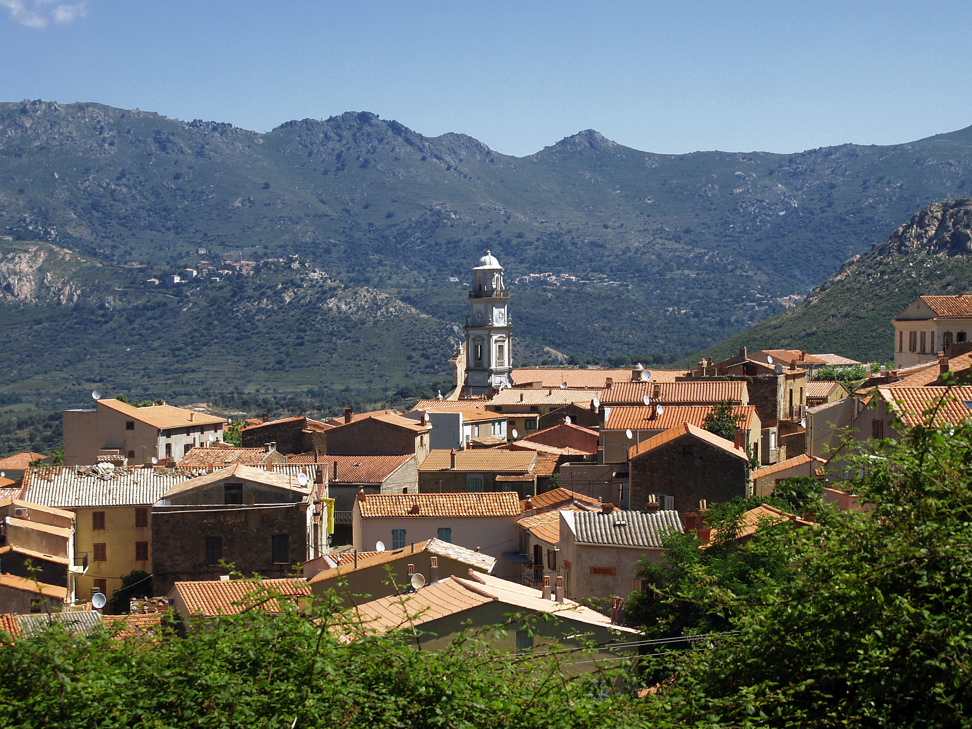 Calenzana - Le village